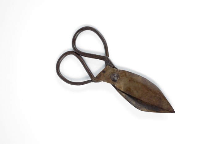 Schapenscheerderschaar, die daarnaast gebruikt wordt als ritme-instrument bij het zingen. Ook andere gebruiksvoorwerpen worden bij gebrek aan de juiste instrumenten ingezet om zang en dans te begeleiden, zoals bijvoorbeeld pannen als trommels worden gebruikt. De schaar wordt in geopende stand beslagen met een grote spijker, zodoende wordt een groter bereik verkregen (Rault, 2000:177).